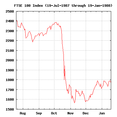 Lundi noir - Cours du FTSE 100 Index du 19 juillet 1987 au 19 janvier 1988 Image dans le domaine public venant de la version anglaise de Wikipédia